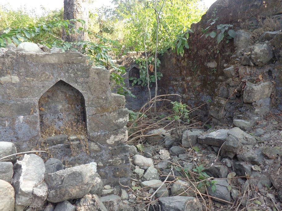 नेपाल भाषा: Braham dev raja